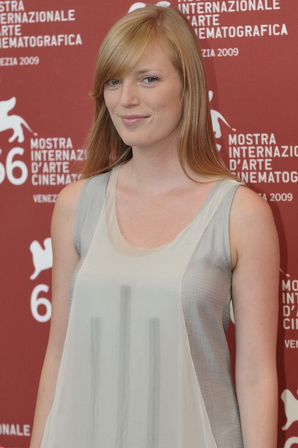 66ème Festival du Cinéma de Venise (Mostra), 10ème jour (11/09/2009) Photocall avec Jared Leto, Diane Kruger, Sarah Polley et le réalisateur Jaco Van Dormel pour le film : MR. NOBODY